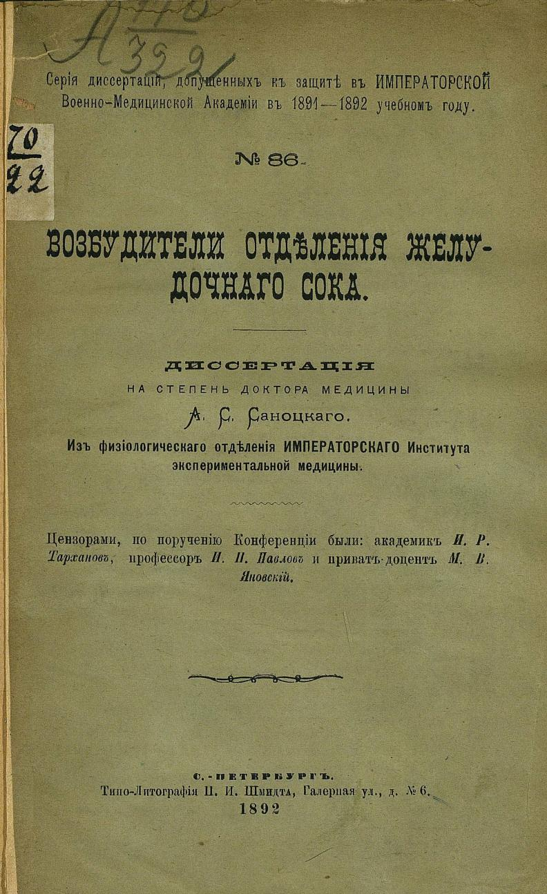 Титульная страница диссертации А.С. Саноцкого